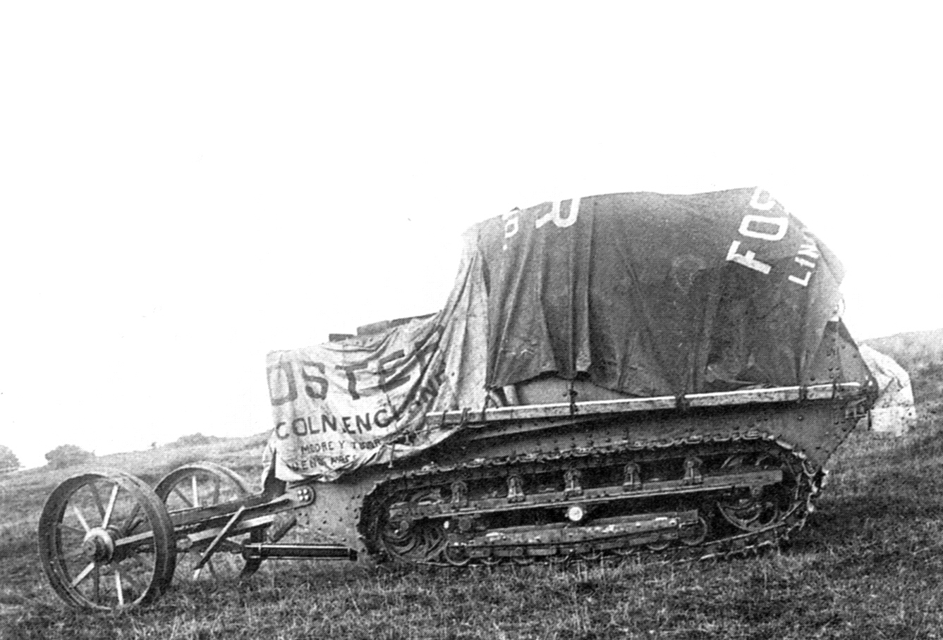 Digitale reproductie foto van de Number one Licoln Machine